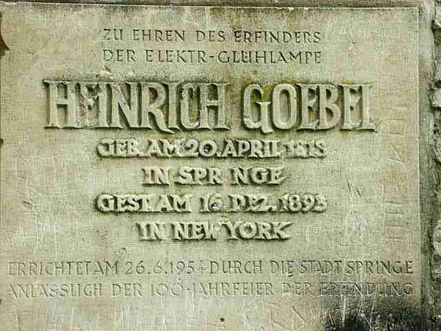 Goebel-Bastei Springe Inschrift, Foto von 2003